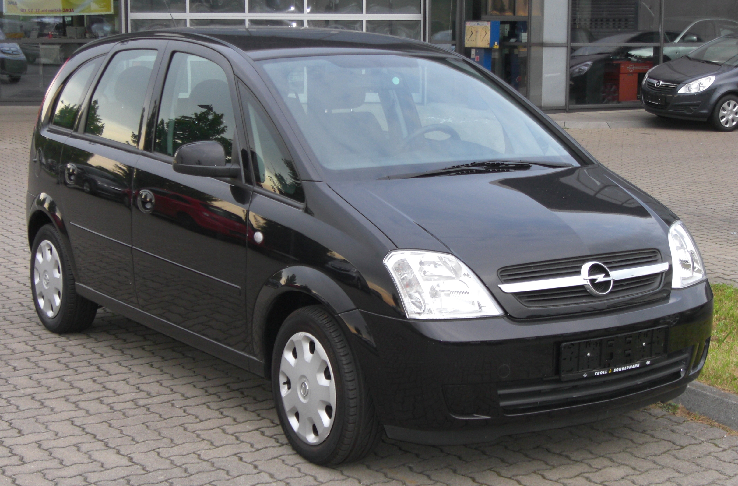 Opel Meriva